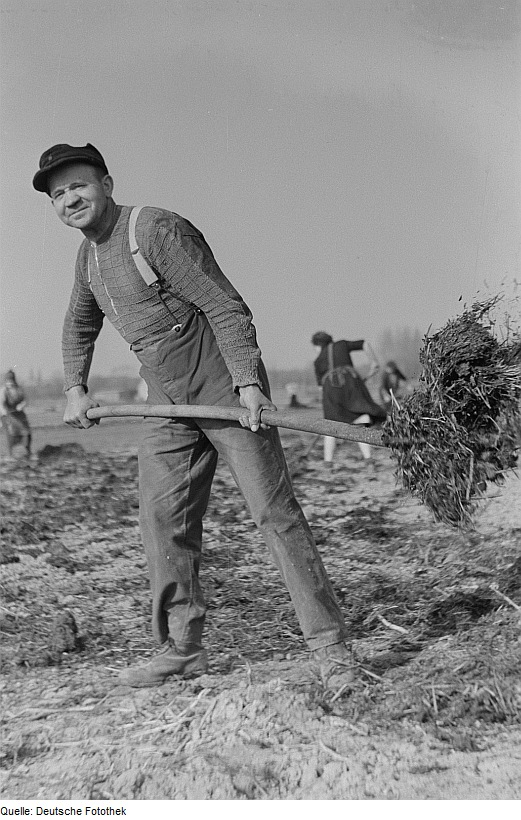 Original image description from the Deutsche Fotothek Genossenschaftsbauer Grygo beim Dungbreiten